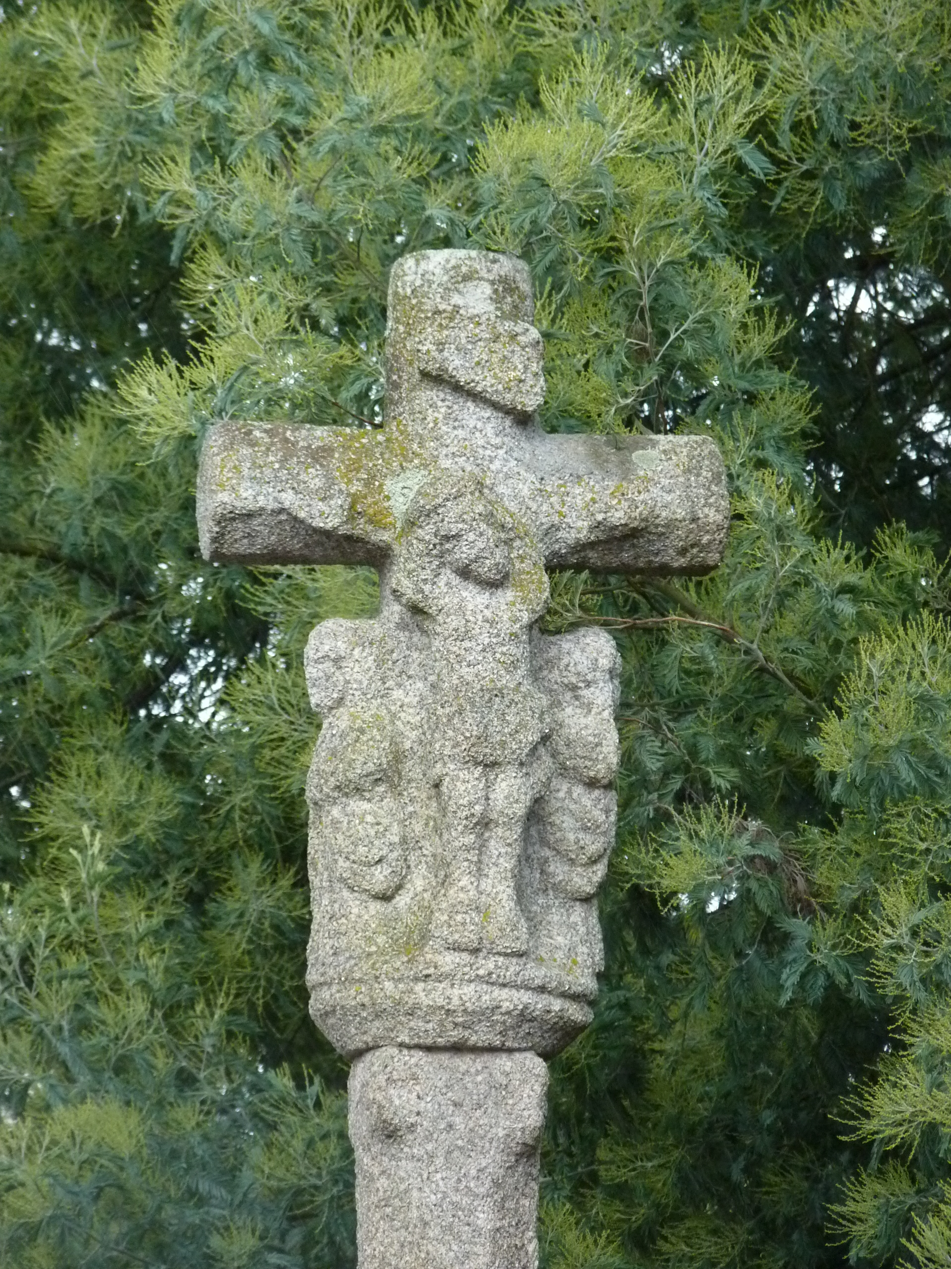 Croix du 18ème siècle à Saint-Caradec (rue de Kercado) (1766)